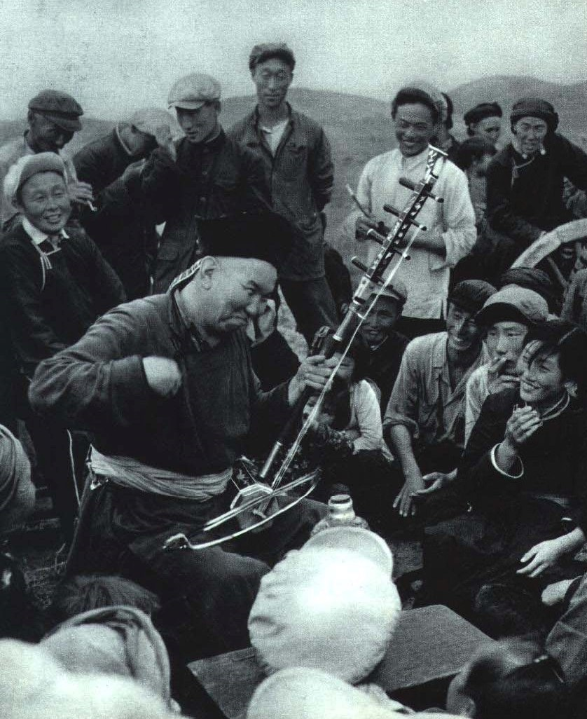 1964-10 1964年 毛依罕在为牧民演唱